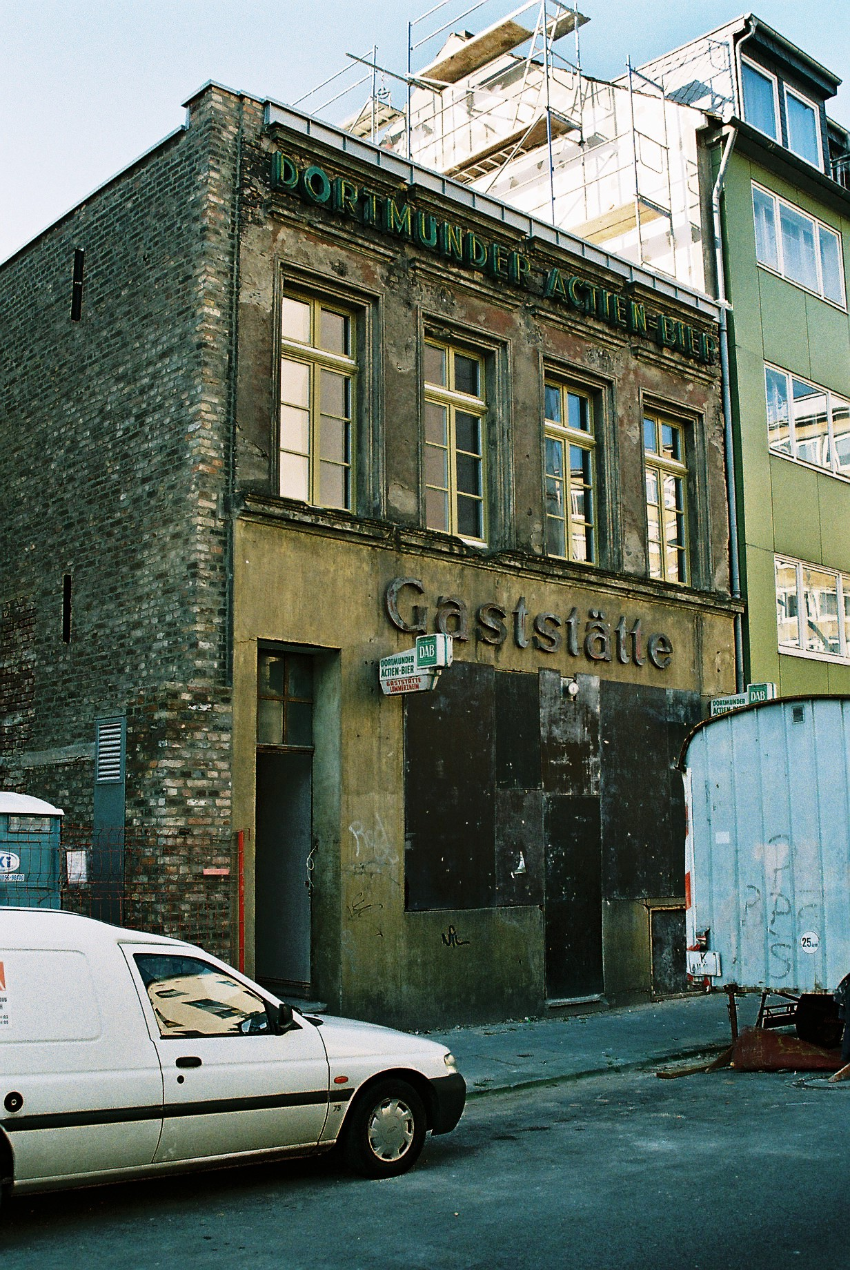 ehemalige Gaststätte „Lommerzheim“, Köln-Deutz, Umbauarbeiten